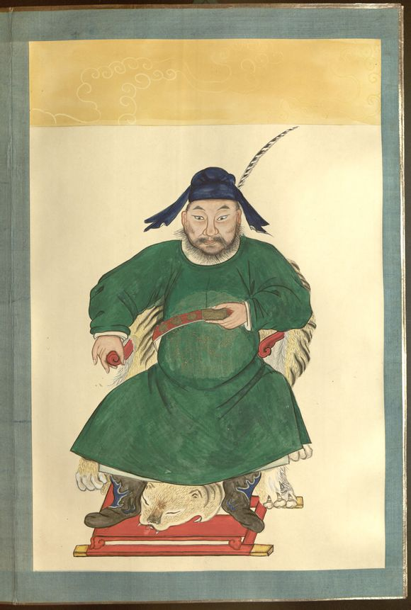 阿胡阿烈，丽江土司。